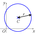 Cercle de centre C et de rayon r